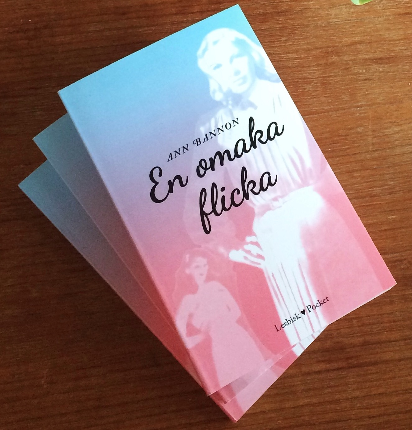 Foto av boken En omaka flicka av författaren Ann Bannon. Utgiven av förlaget Lesbisk Pocket år 2015.